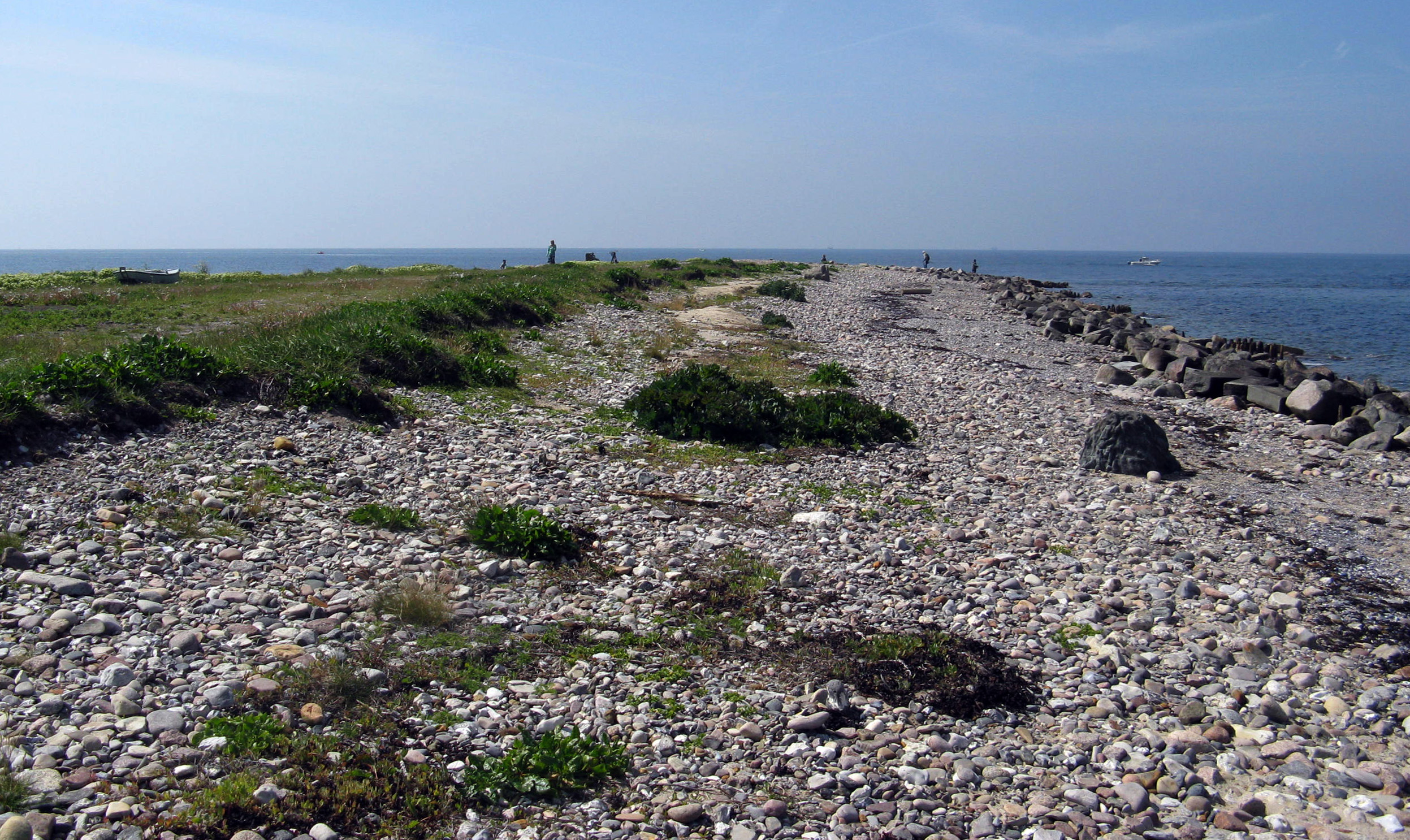 Halskov Odde set mod sydvest